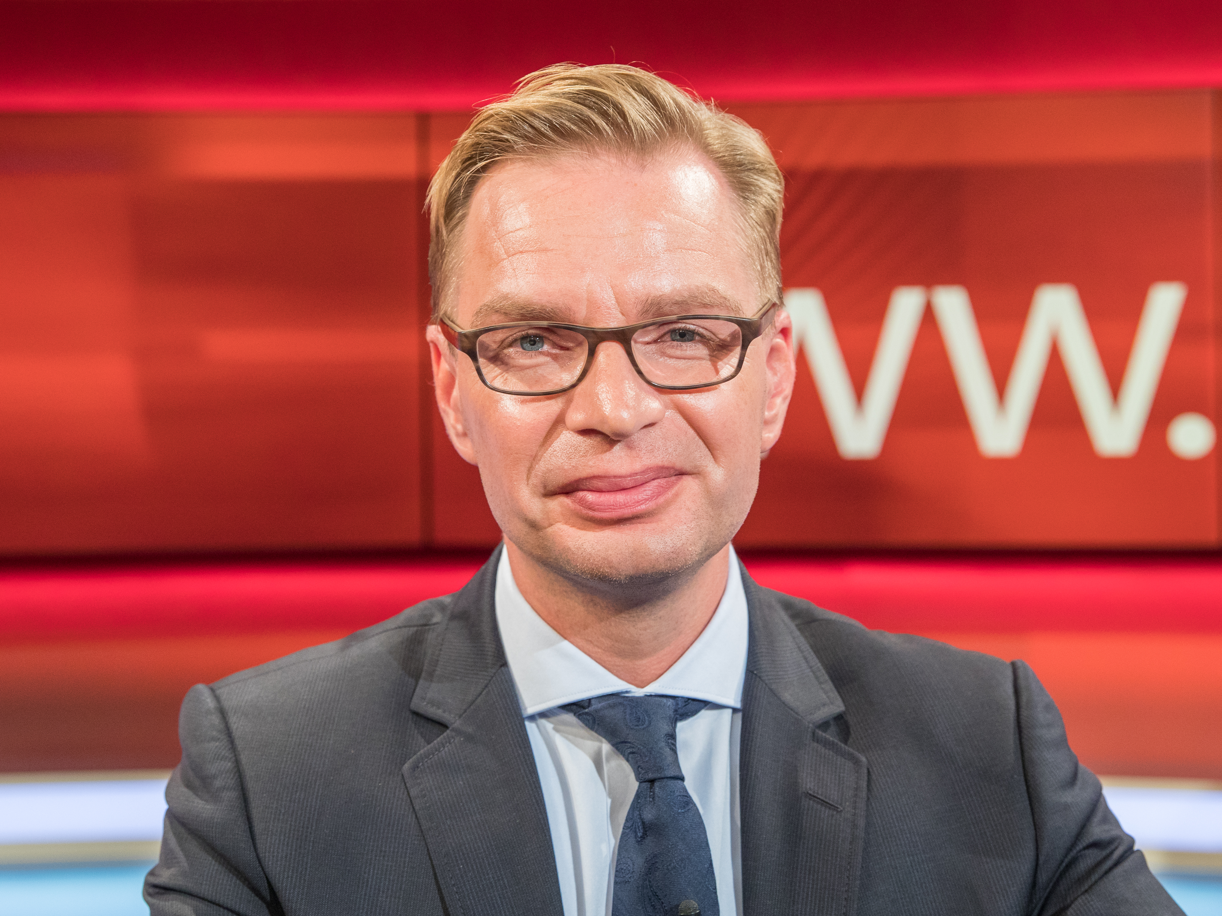 Hart aber fair, Sendung vom 8. Oktober 2018. Frank Plasberg diskutiert das Thema: "Der Staat schwimmt im Geld – aber warum haben die Bürger so wenig davon" Foto: Reiner Holznagel, Präsident Bund der Steuerzahler